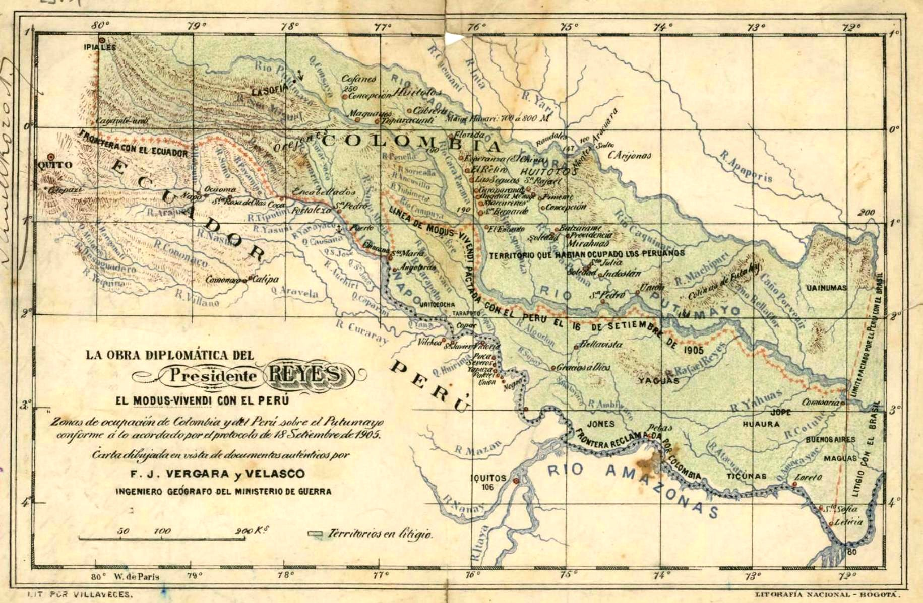 La obra diplomática del presidente Reyes. El Modus-Vivendi con el Perú. Zonas de ocupación de Colombia y del Perú sobre el Putumayo conforme á lo acordado por el protocolo de 18 de se[p]tiembre de 1905.